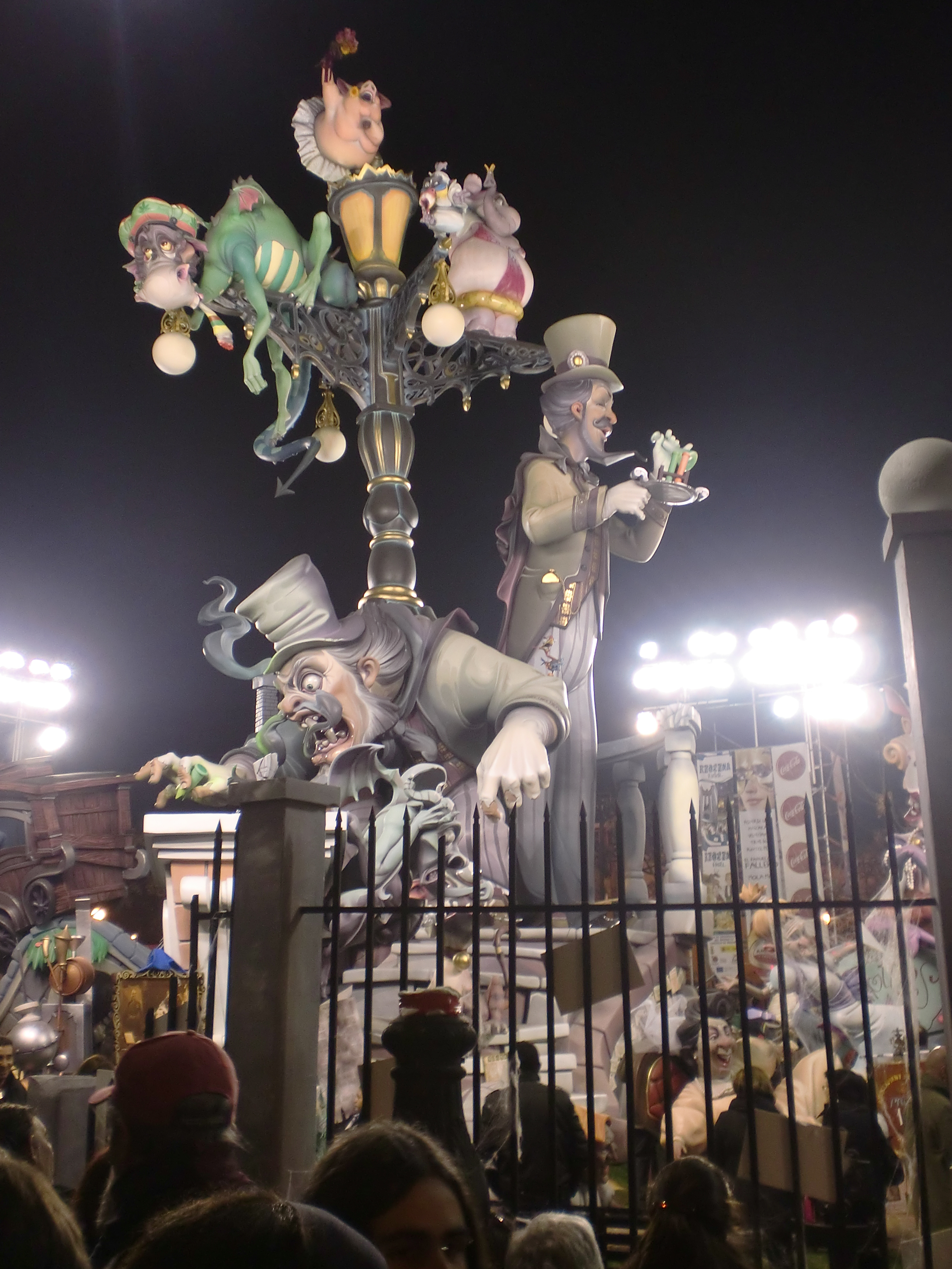 Falla Na Jordana (Valencia)